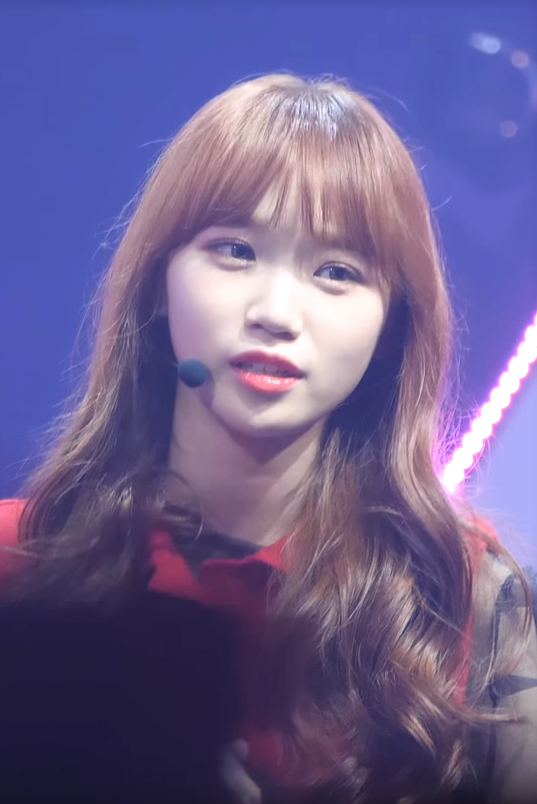 아이즈원 (IZ*ONE) '멤버별 데뷔소감' 직캠 Fancam @IZ*ONE SHOW-CON